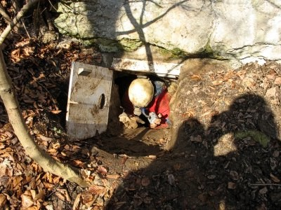 Eingang zur "Blätterhöhle" in Hagen, Frühjahr 2006. Der heutige Eingang ist vermutlich nur der obere Teil einer von Lehm- und Steinschichten verschütteten größeren Höhle.